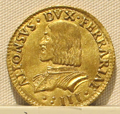 Palazzo Massimo alle Terme